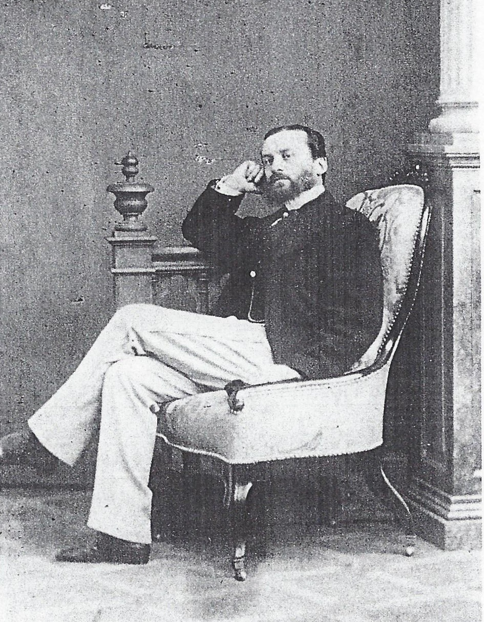 Porträtfotografie von Reichsgraf Hans von Oppersdorff (1832-1877)